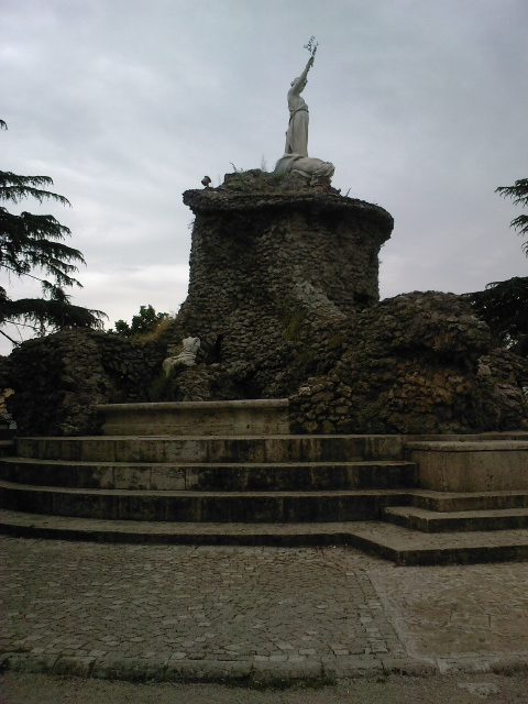 La Fontana Biondi, al centro di Piazza XIX Marzo a Cisterna